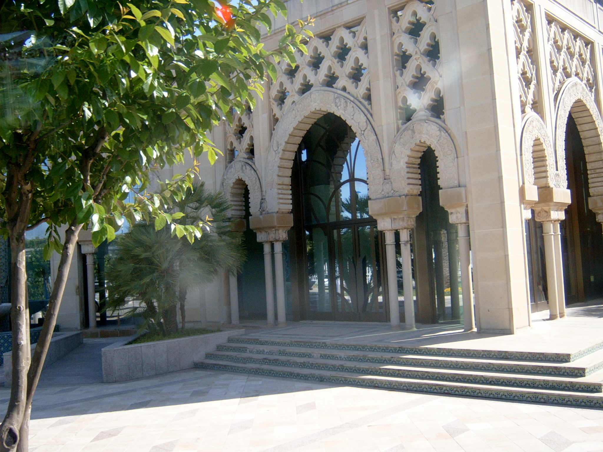 Pabellón de Marruecos durante la Exposición Universal de Sevilla (1992)